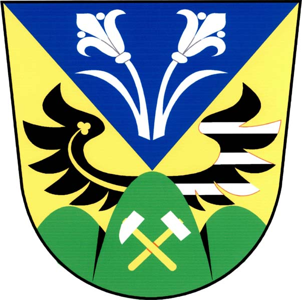 Znak obce Rozseč nad Kunštátem